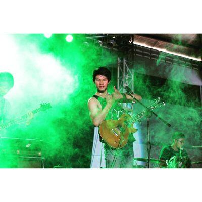 bagas sigit nugroho